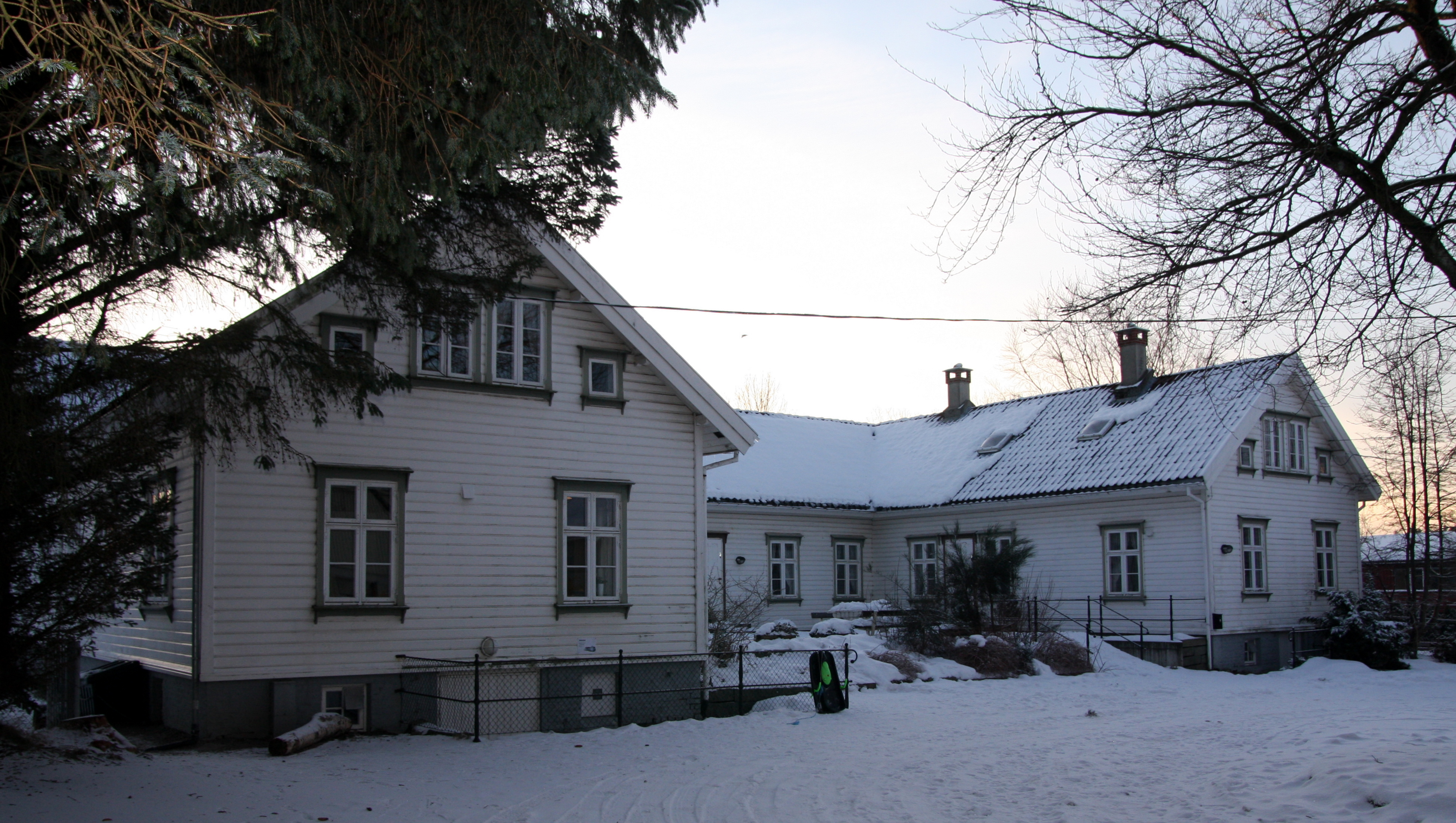 Varatun Gård, Sandnes